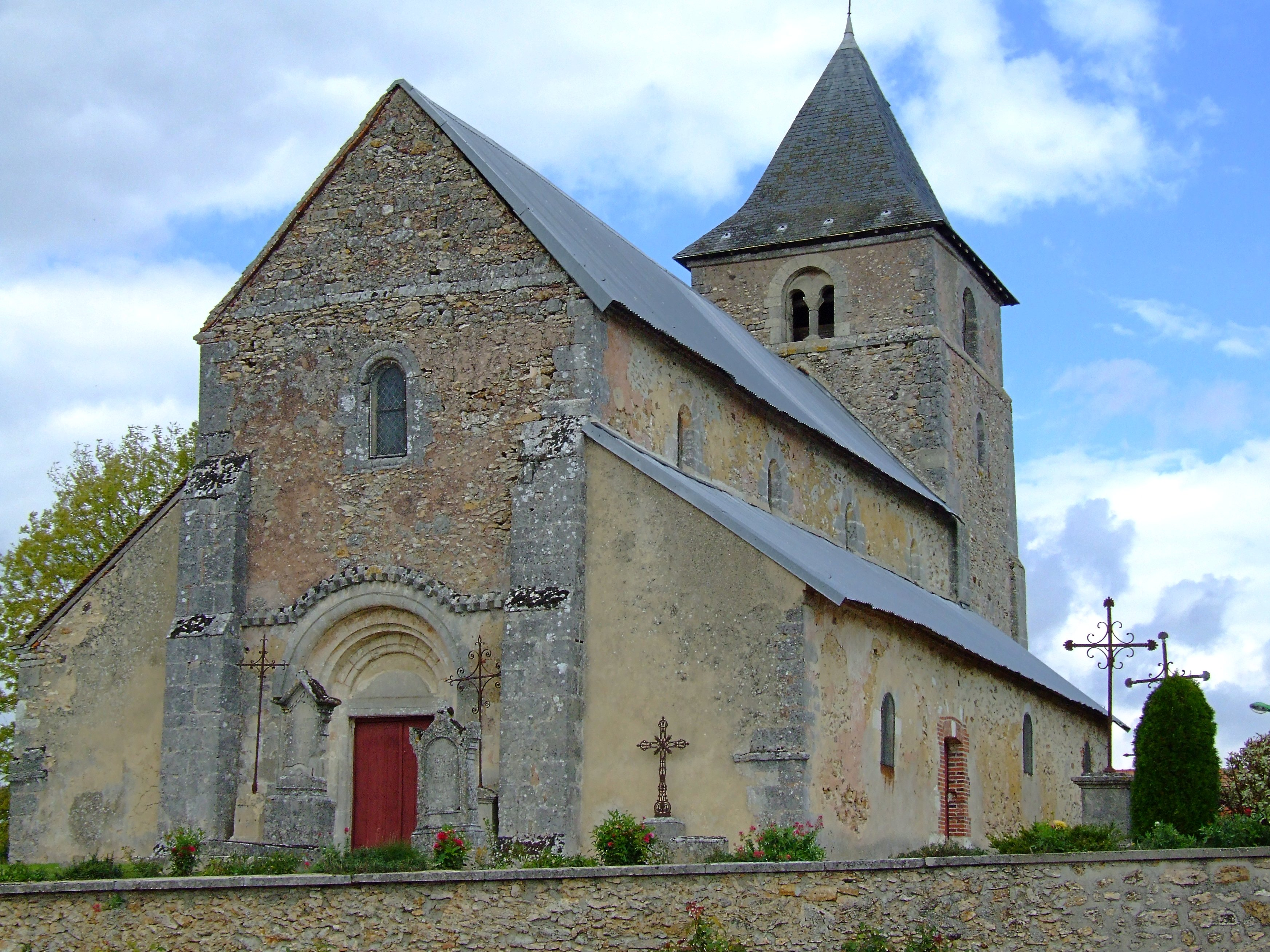 Église de Coizard-Joches